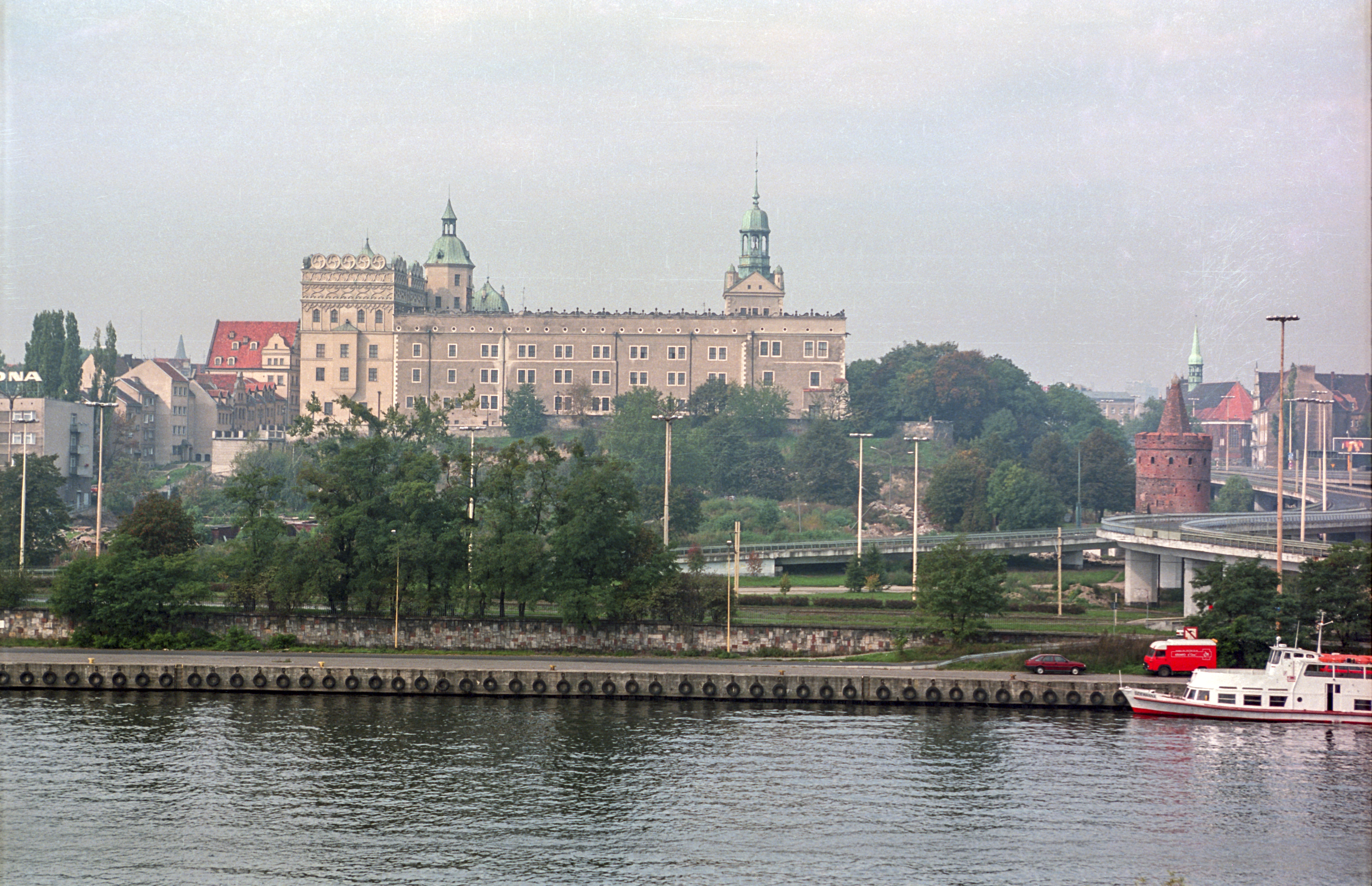 Poland, Szczecin Castle